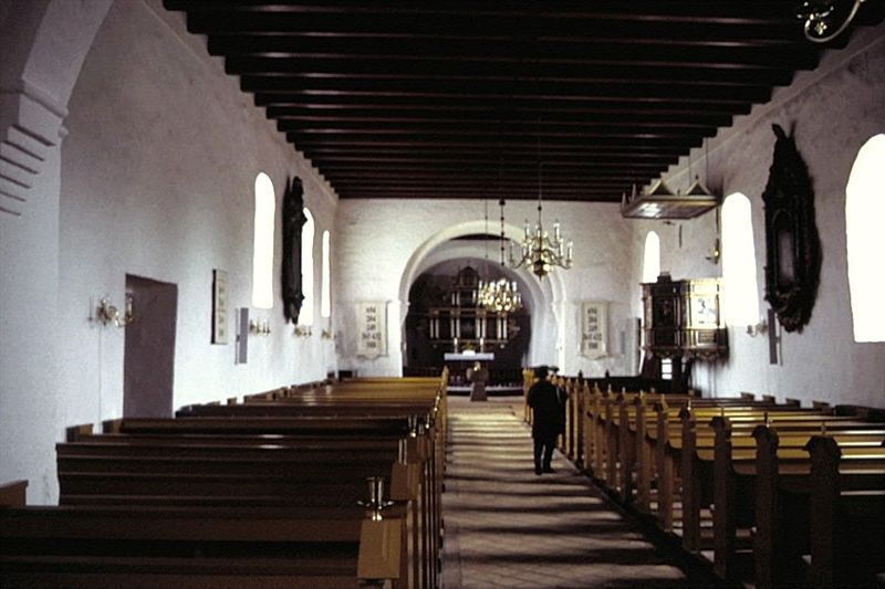 Tårs Kirke i Danmark. Skib set mod øst